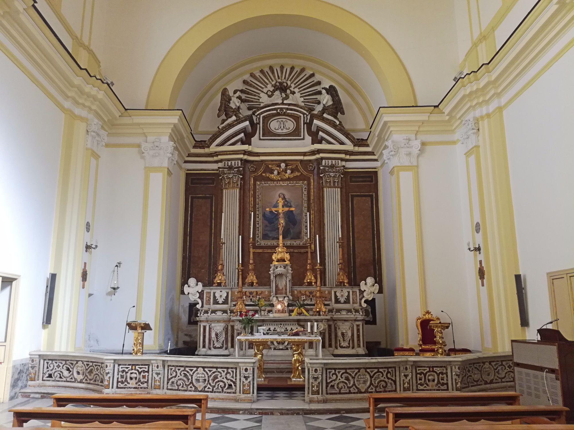 Interno, Maria dei Vergini, Napoli